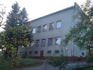 Obecný úrad